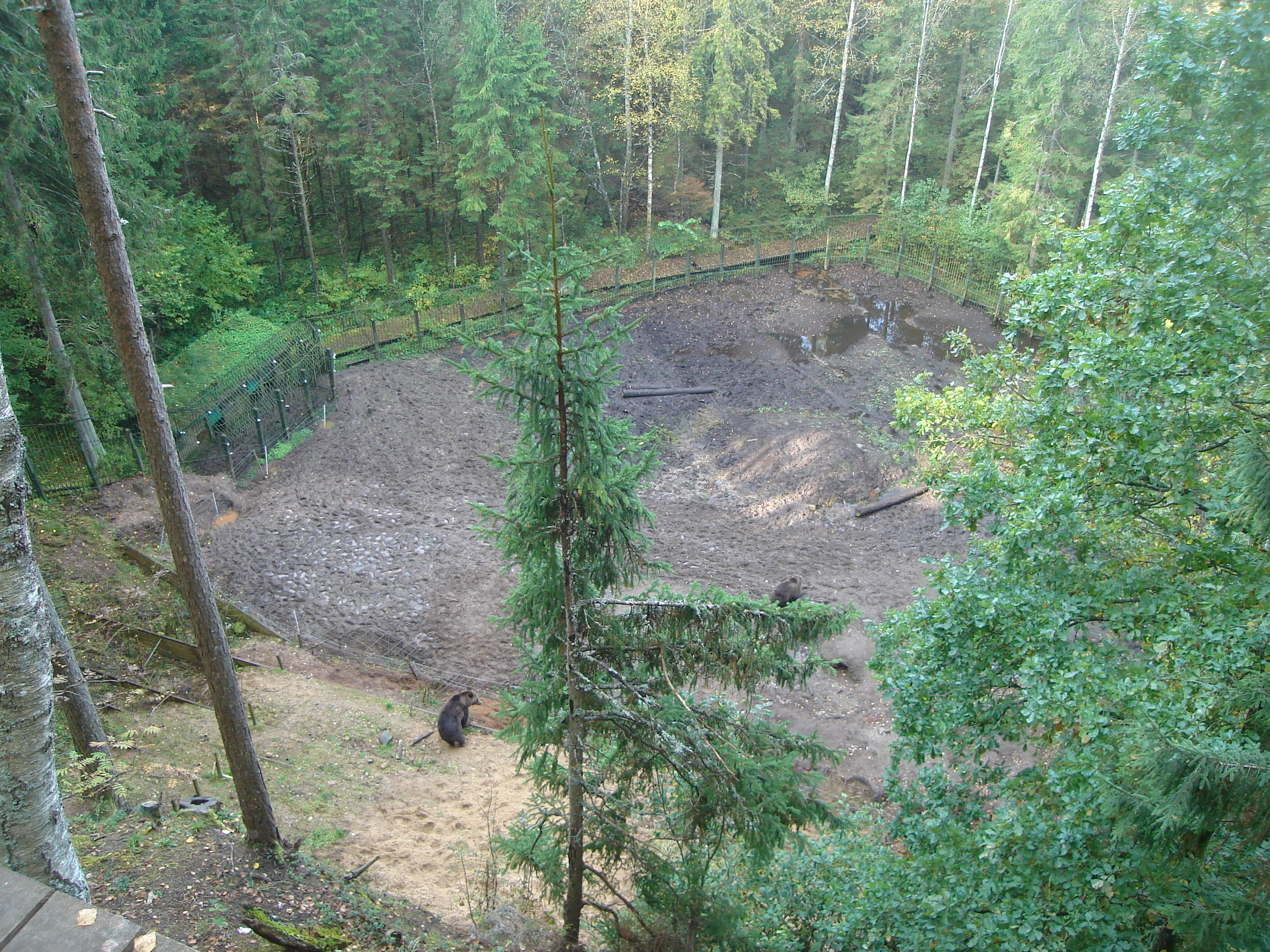 Lāči. 57°14′36.2″N 25°00′41.8″E